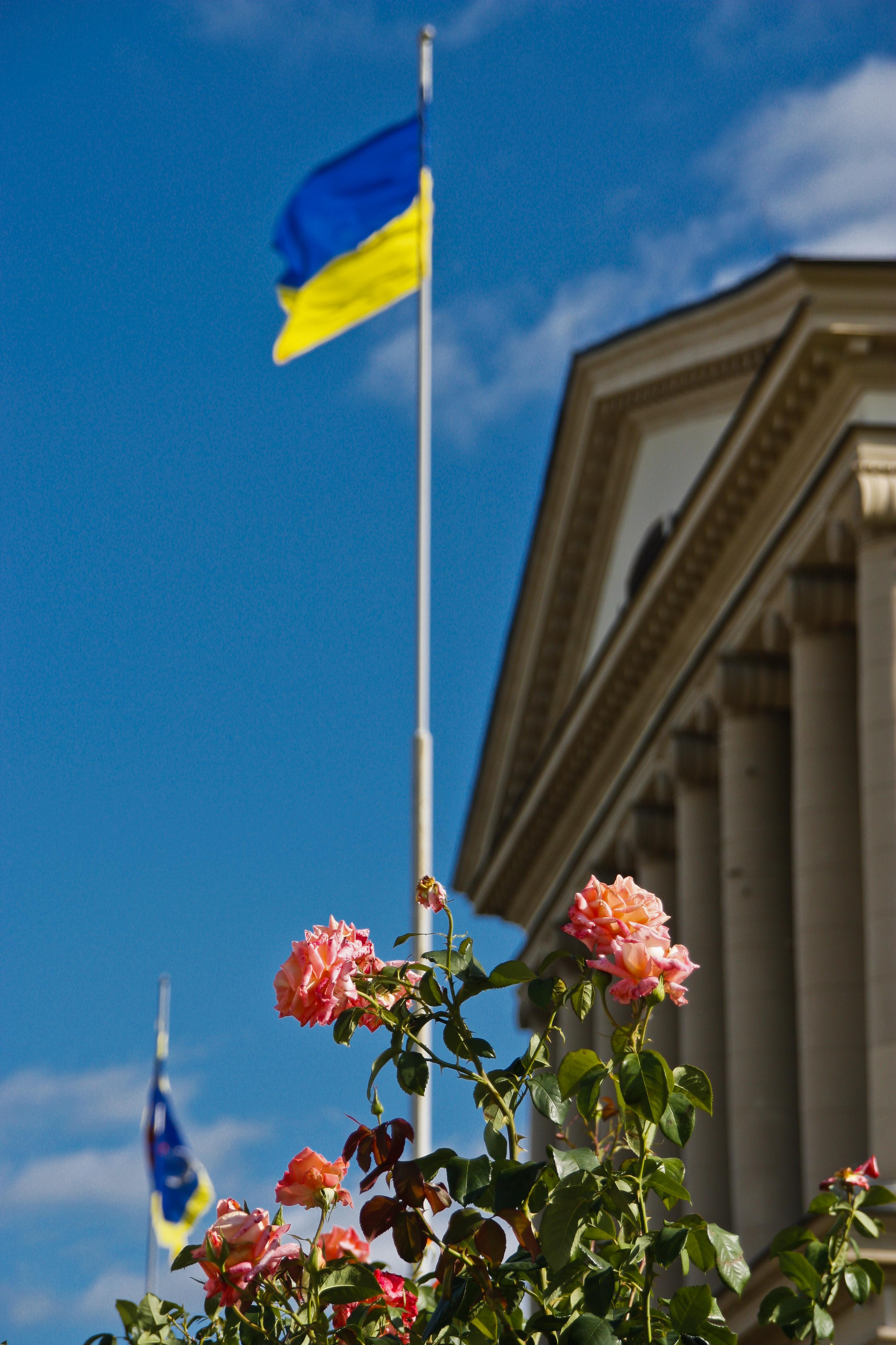 Парк біля палацу К. Розумовського, Батурин, вул. Набережна, 1